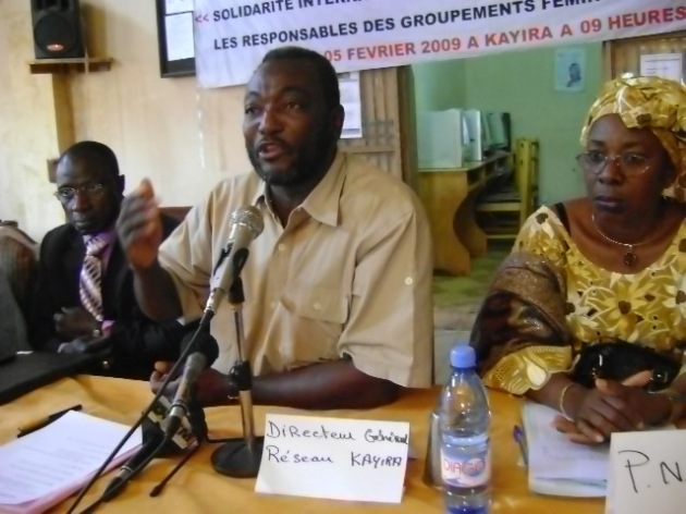 Oumar Mariko, secrétaire général de la Solidarité africaine pour la démocratie et l'indépendance, juin 2009